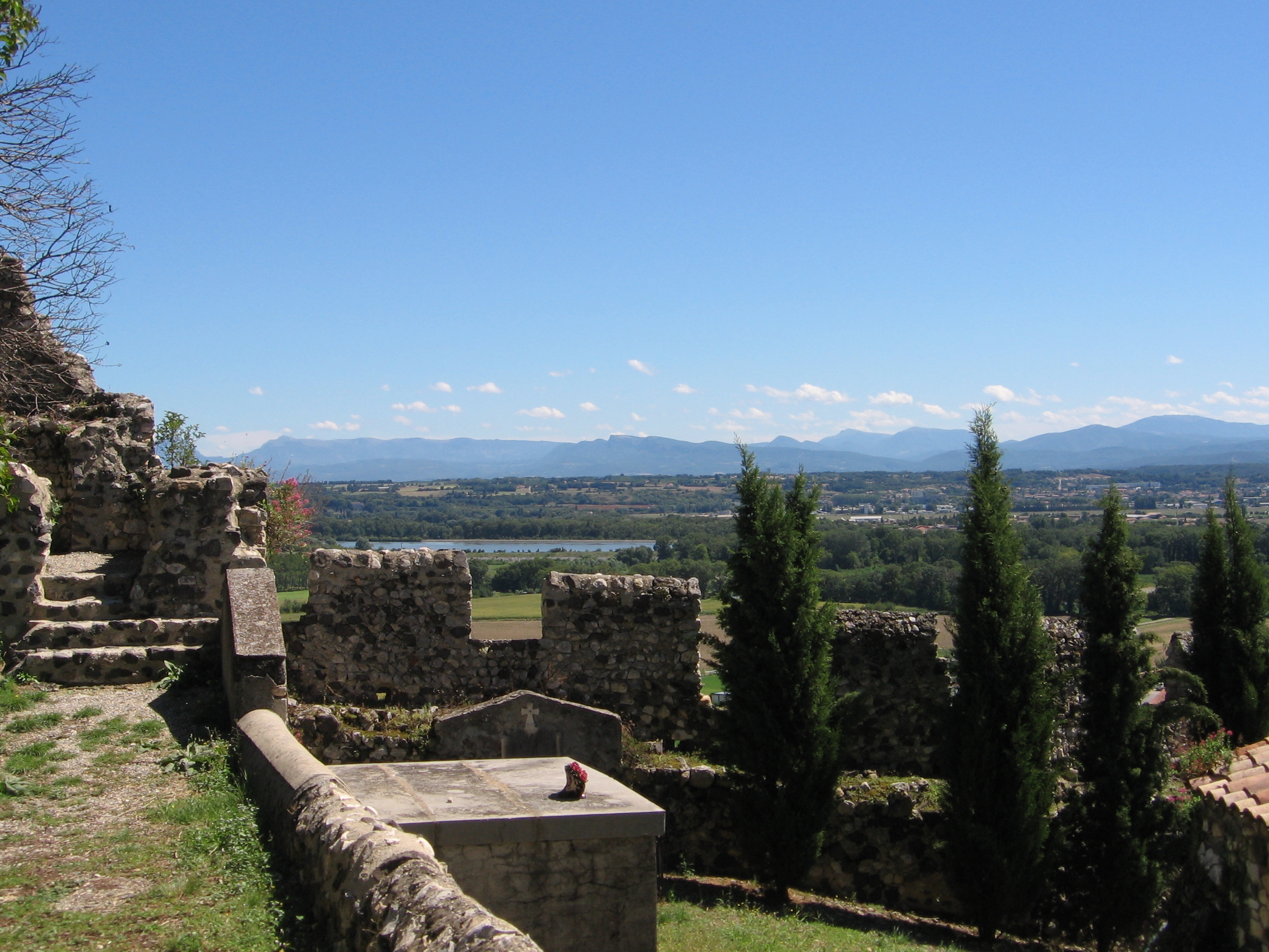 Rochemaure castle, France